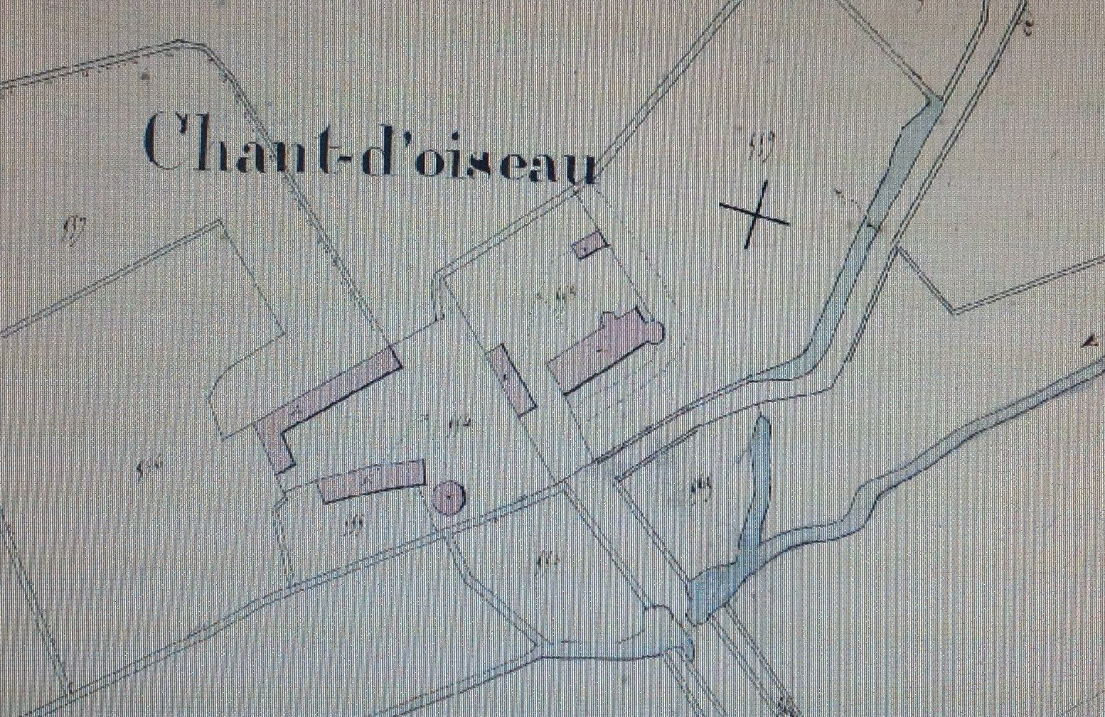 Chandoiseau Plan Cadastre Napolénien